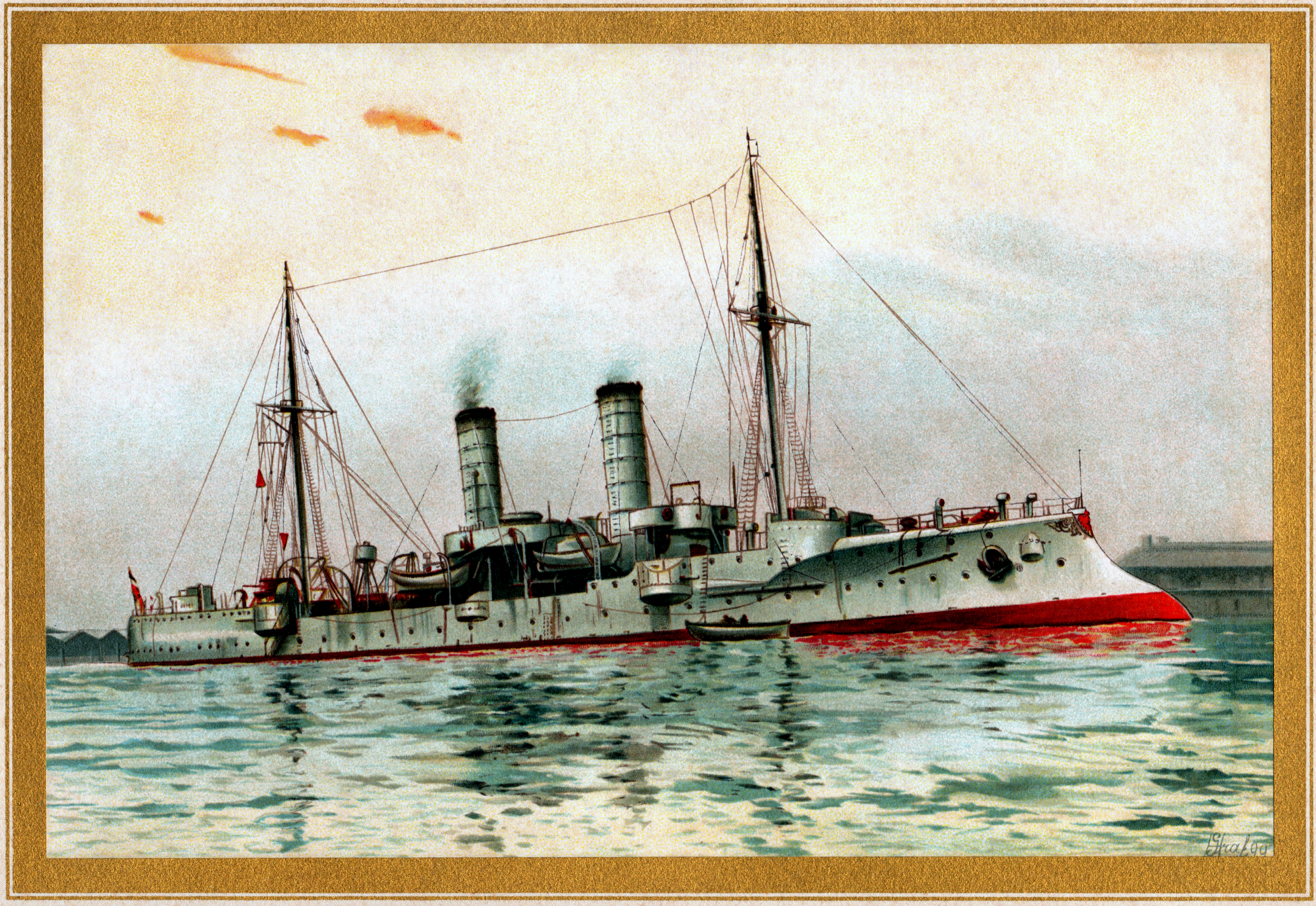 S.M. kleiner Kreuzer Gazelle.